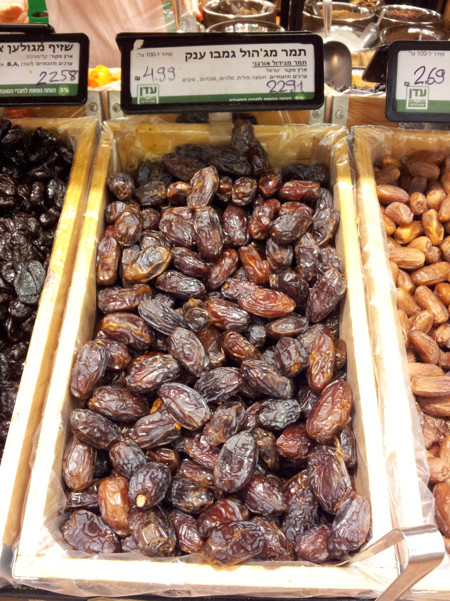 תמרים מסוג מג'הול במרכול בירושלים